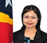 Maria Adozinda Pires da Silva, Abgeordnete aus Osttimor